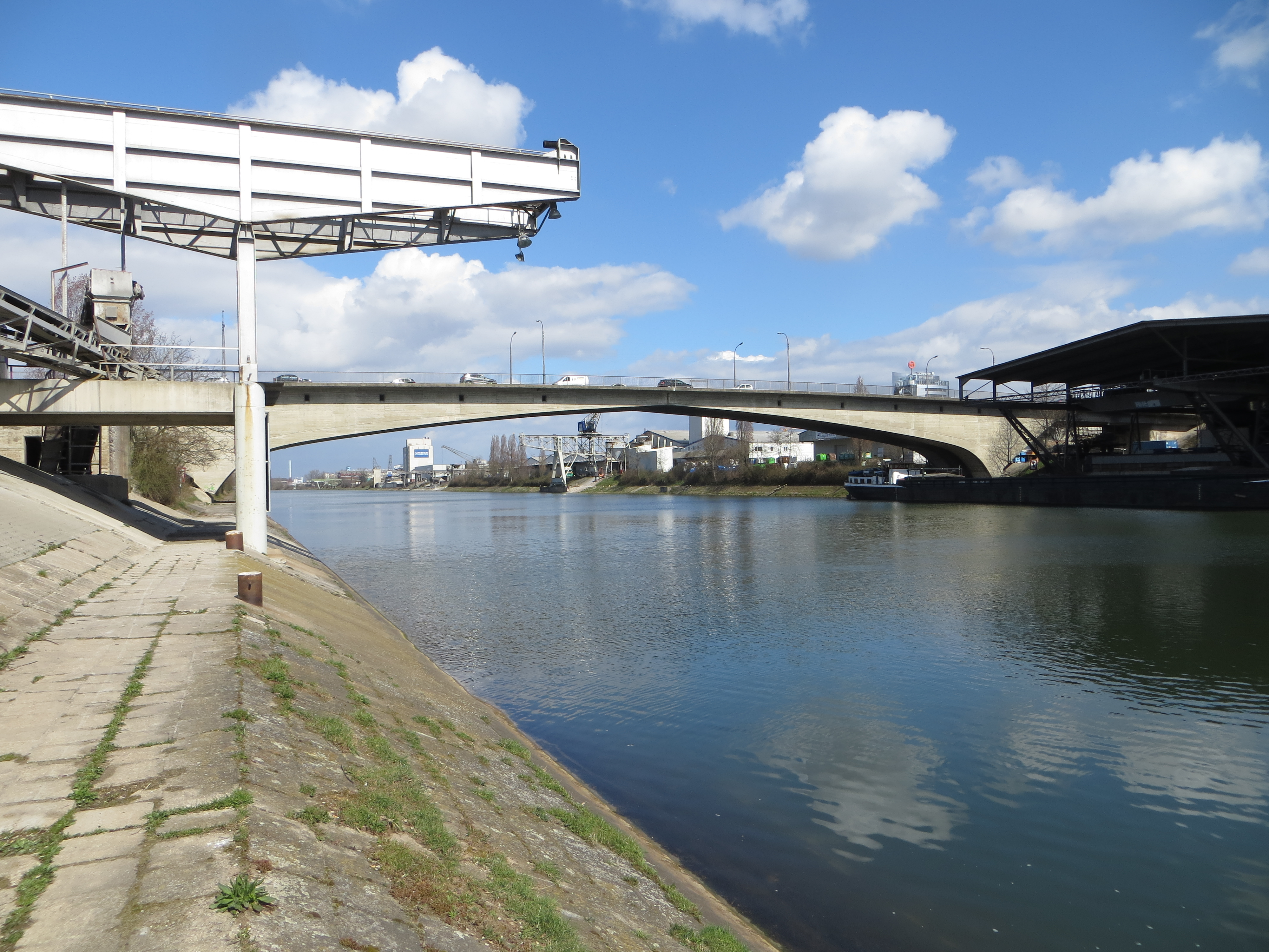 Der Neckarkanal in Heilbronn, Blick nach Norden. In der Bildmitte die Peter-Bruckmann-Brücke.